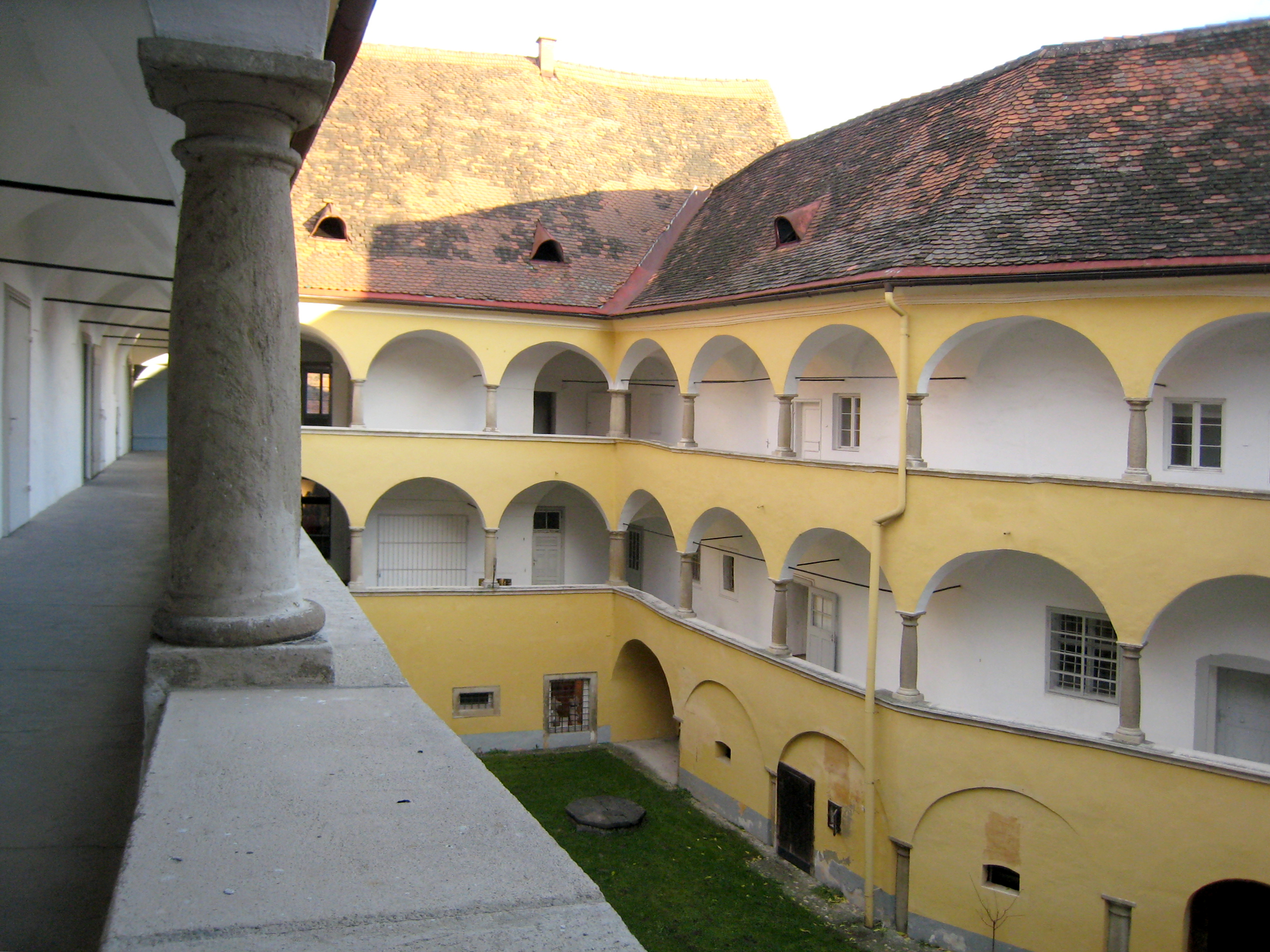 Ehem. Palais Herberstorff, Freysingerhof